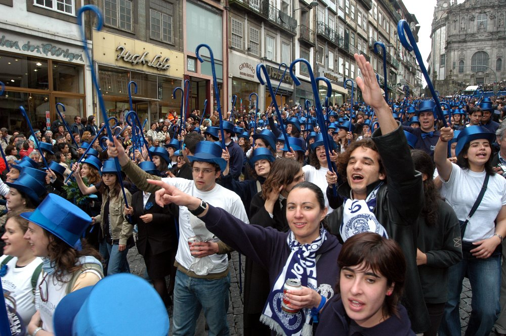 Queima das Fitas, uma festividade tradicional que ocorre em algumas universidades portuguesas todos os anos.